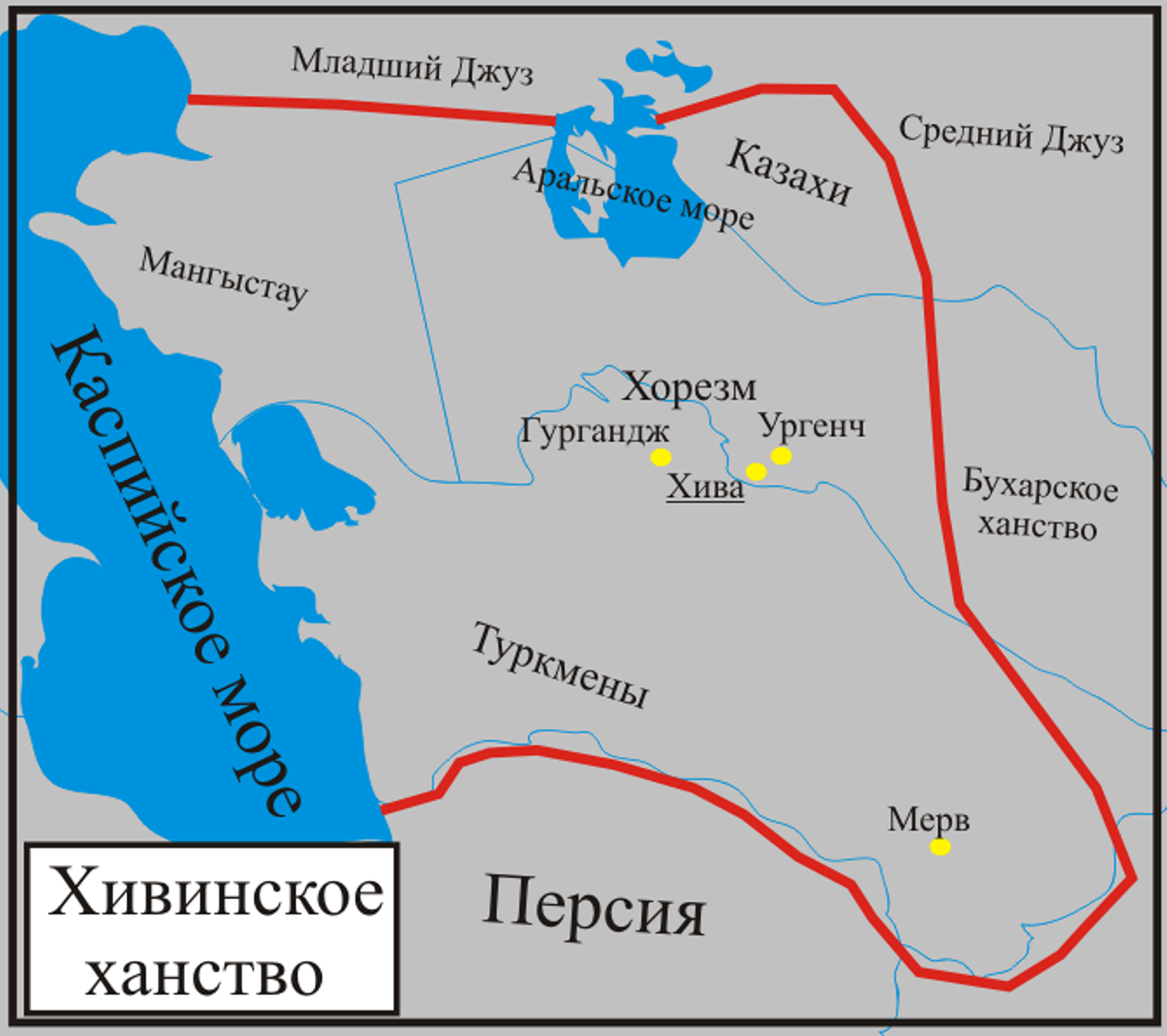 Карта Хивинского ханства